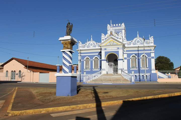 Palácio Episcopal, em Luz-MG